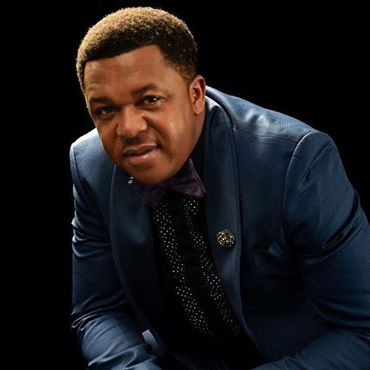 Francis Duru, acteur Nigérian du Nollywood, à Abuja, le 9 juin 2020. (VOA/Gilbert Tamba)